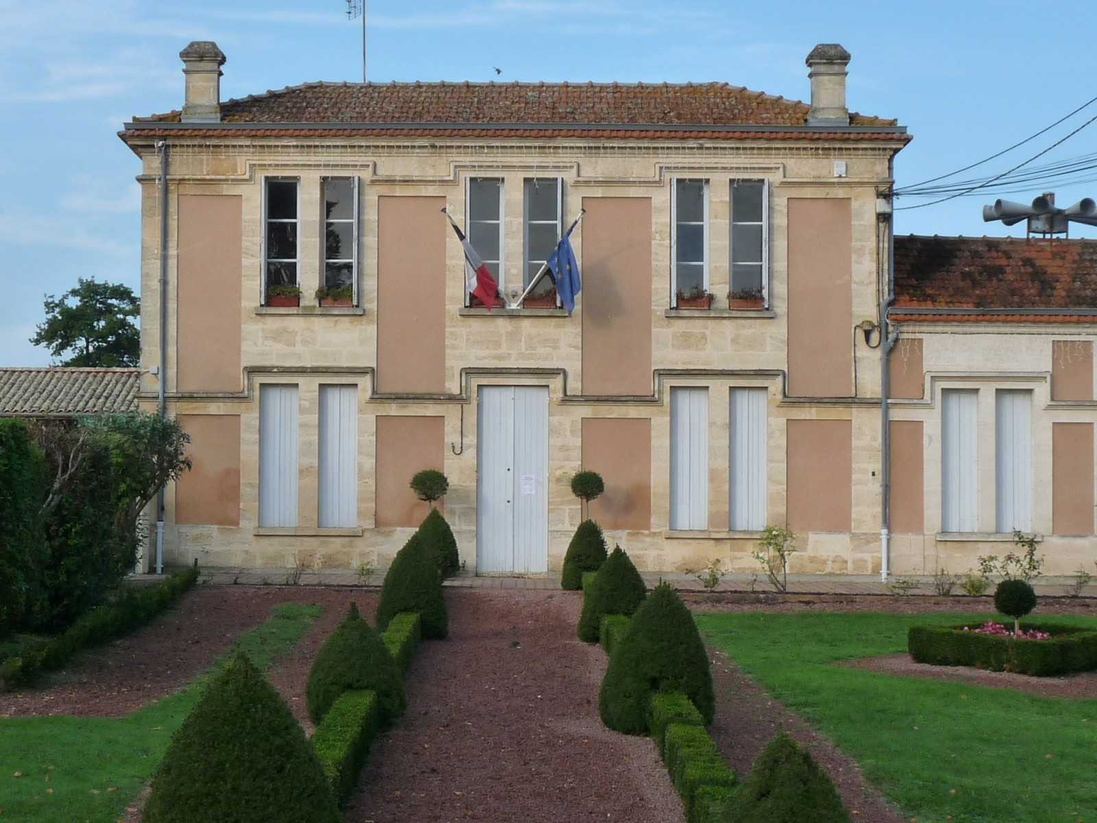 Mairie de Campugnan, Gironde, France